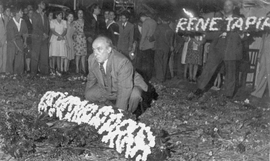 1946. Elías Lafertte deposita ofrenda por las victimas de incidentes en Plaza Bulnes.